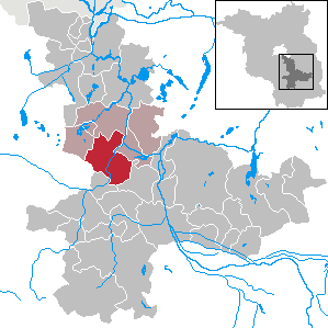 Halbe in Brandenburg (Country) - District Dahme-Spreewald